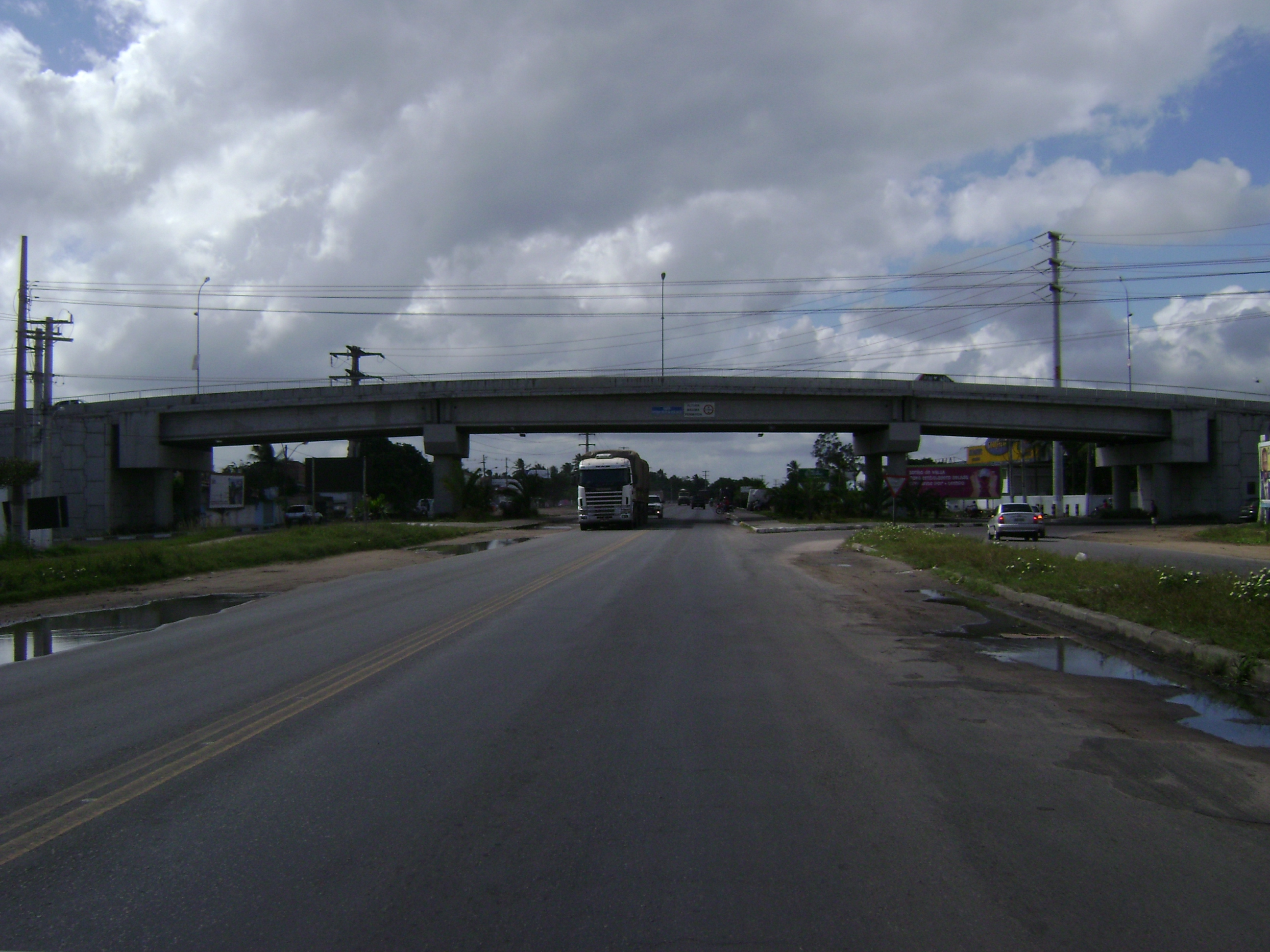 Viaduto no cruzamento entre a avenida do Contorno e a avenida Maria Quitéria, em Feira de Santana, Bahia, Brasil.